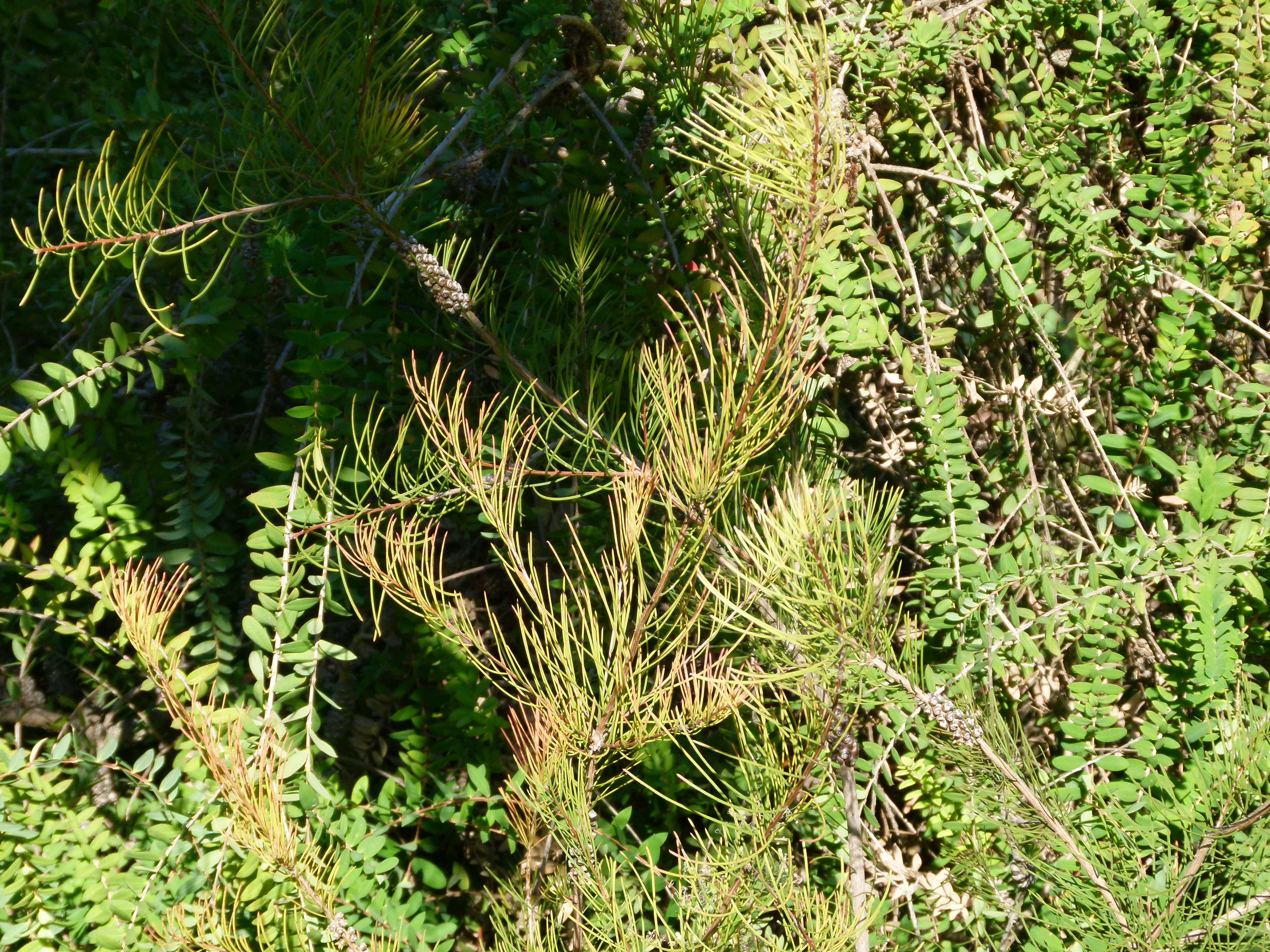 Jardin botanique Montjuic, Barcelone